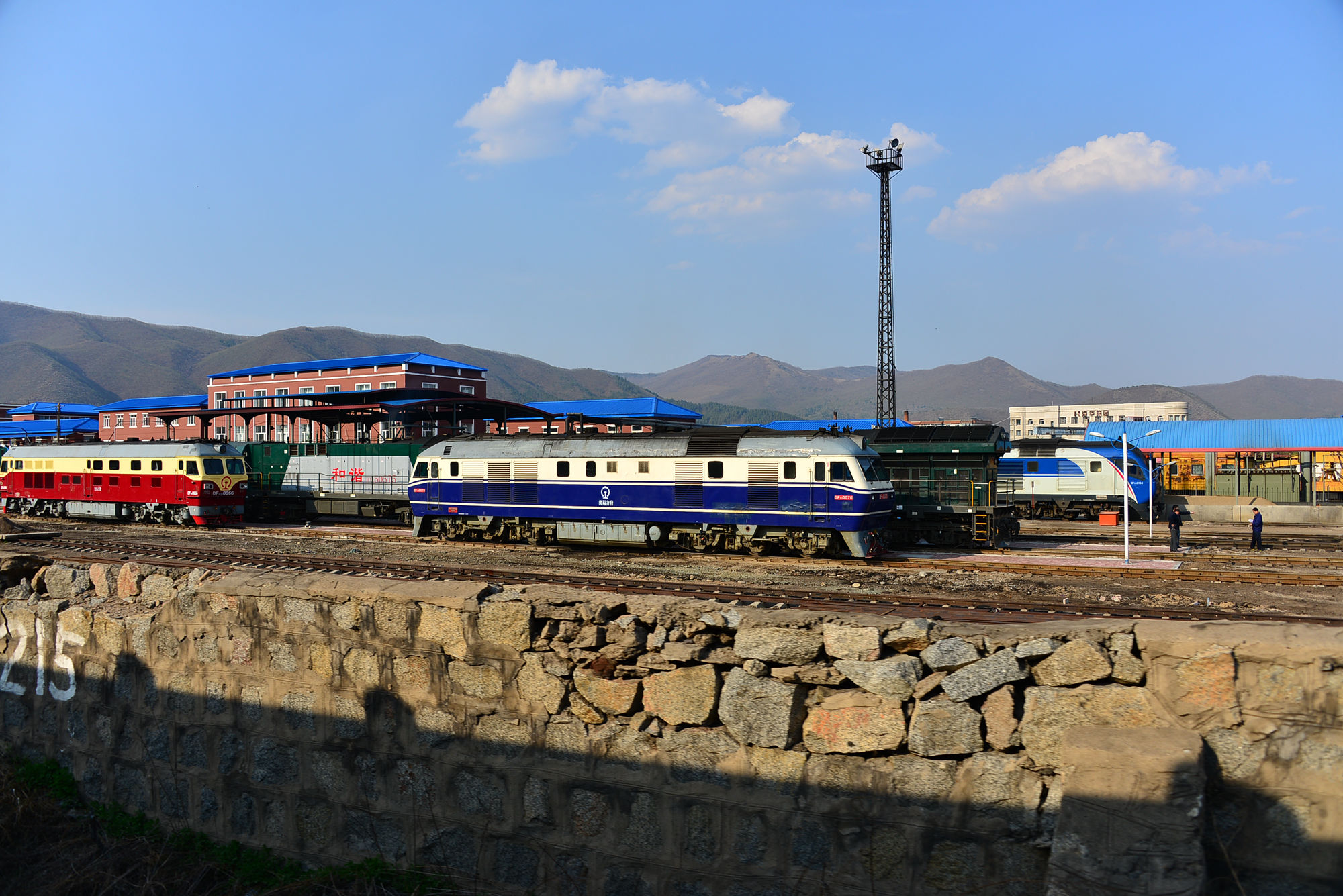 巡道工出品 photo by Xundaogong 图们机务段